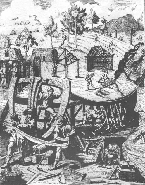 Construcción de un navío. En Historia general de las Indias Occidentales o de los hechos de los castellanos en las Islas de Tierra Firme del Mar Océano, por Antonio de Herrera. Amberes, 1728